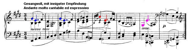 Die ersten acht Takte aus dem dritten Satz aus Beethovens Klaviersonate Opus 109